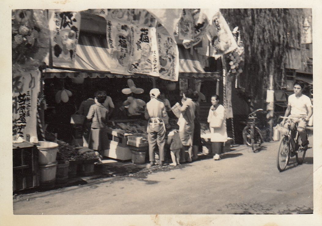 二子玉川商店街松原屋食料品店開店の様子 昭和37年10月10日撮影 当時は開店時にビラ（引き札）と呼ばれるポスターのようなものを掲出する風習があった